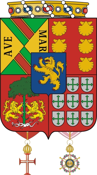 Brasão de Armas: Escudo esquartelado: no primeiro quartel as armas dos Mendonças, que são o escudo franchado, ao primeiro de verde, uma banda vermelha coticada de ouro ; no segundo um S preto, em campo de ouro; e assim dos contrários. No segundo quartel, as armas dos Vieiras, — em campo vermelho seis vieiras de ouro em duas palas. No terceiro as dos Mattos, — em campo vermelho um pinheiro de verde, com frutos, perfis e raízes de ouro entre dois leões do mesmo, armados de azul. No quarto as dos Moreiras. Em campo vermelho nove escudetes de prata, e sobre cada um, uma cruz florida verde, como as do Aviz, em três palas. E no meio um cscudete com as armas dos Castelos Branco, que são, em campo azul um leão de ouro rompante, armado de goles. Elmo de prata aberto, guarnecido de ouro. Paquife: dos metais e cores das armas. Timbre: o leão dos Castelos Branco. (Brazão passado em 13 de Setembro de 1861. Reg. no Cartório da Nobreza, Liv. VI, ns. 4.,).